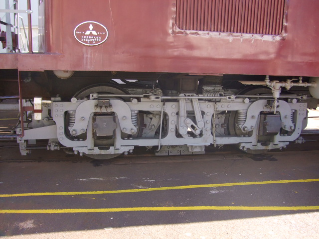 神戸電鉄 700形電気機関車701号の台車（2007年10月6日・鈴蘭台工場一般公開時）